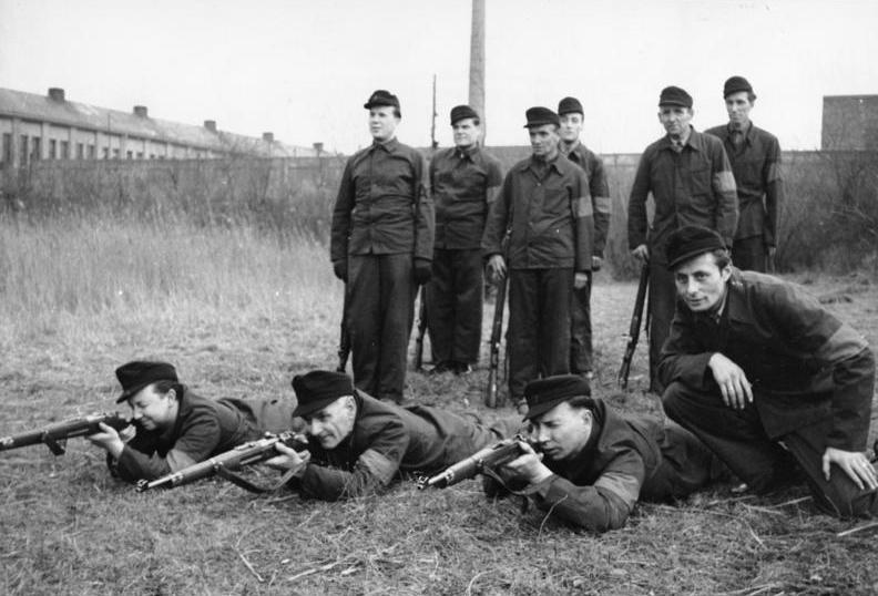 Erfurt, Kampfgruppen- Ausbildung ADN-ZB/Kollektiv/28.1.1956/Erfurt Ausbildung der Kämpfer des Schwermaschinenbau "Henry Pels".